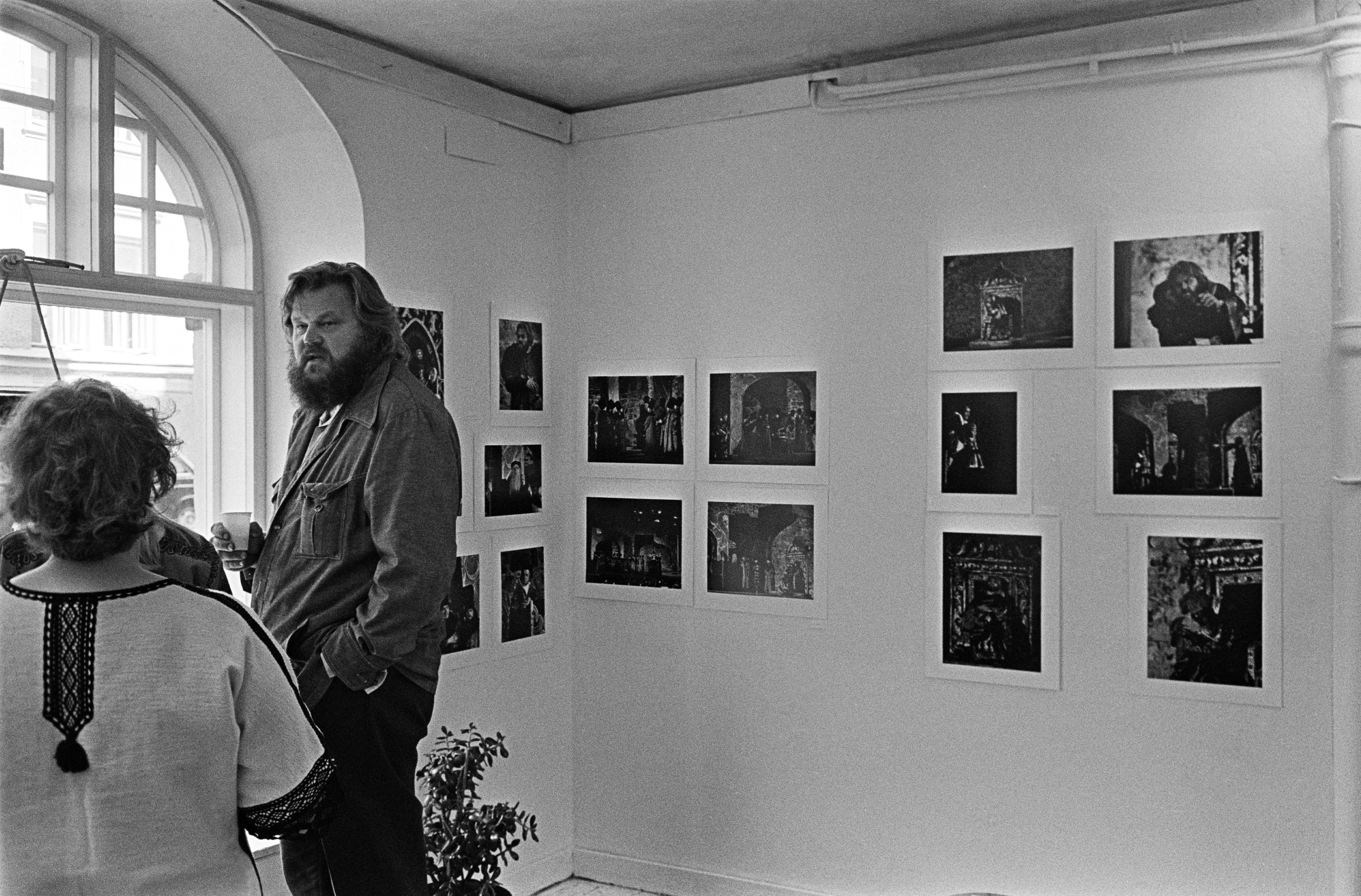 Martti Talvela urastaan kertovan valokuvanäyttelyn avajaisissa.